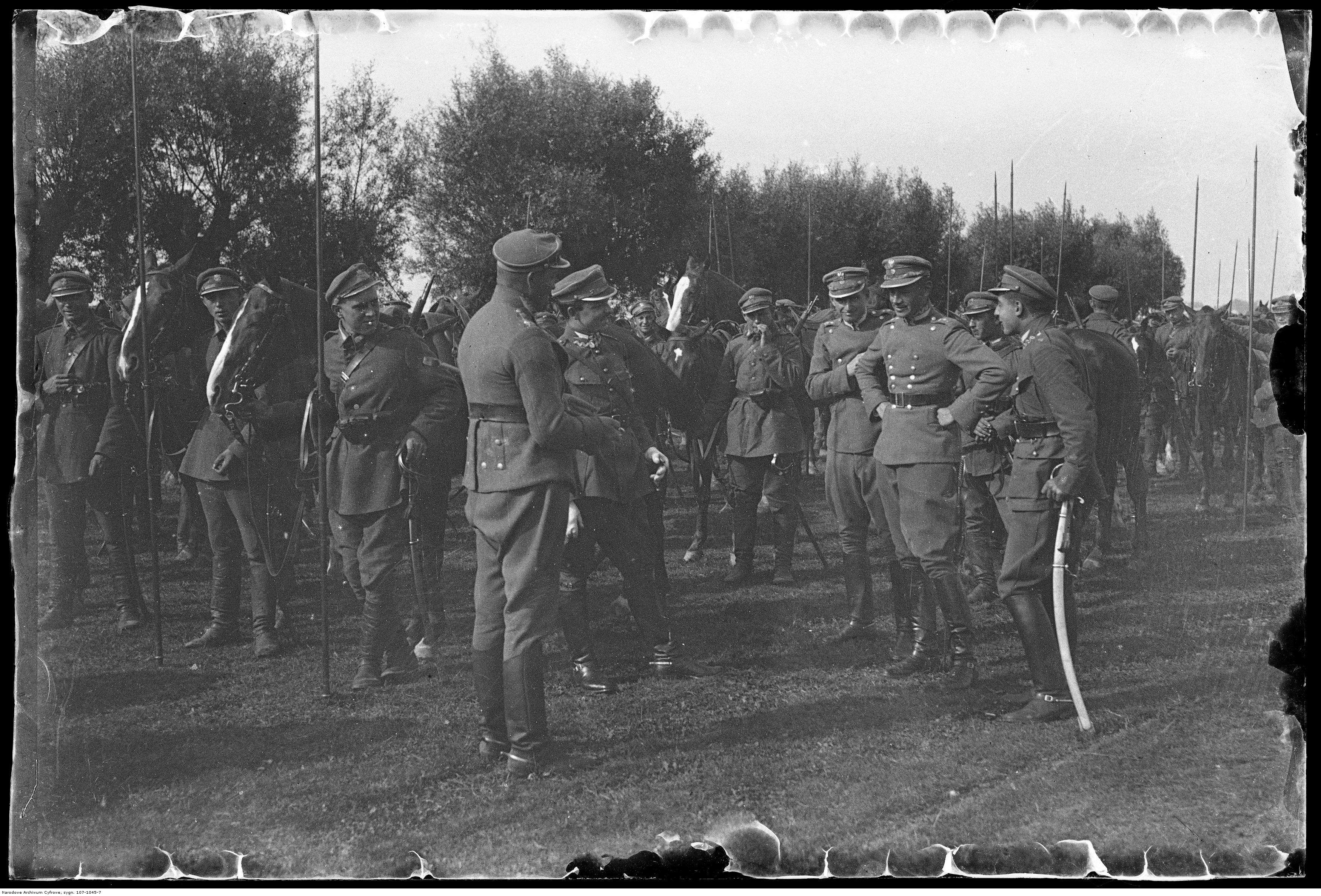 Szwadron z końmi i lancami. Na pierwszym planie z prawej oficerowie - widoczni m.in.: 2. z prawej por. Adam Radomyski, 4. z prawej rtm. Edward Dunin-Markiewicz.